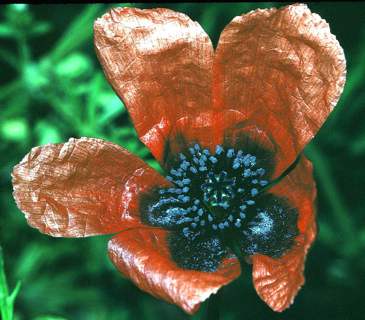 Unterfranken